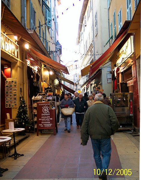 La rue Pairolière en direction de la place Garibaldi (Nord).